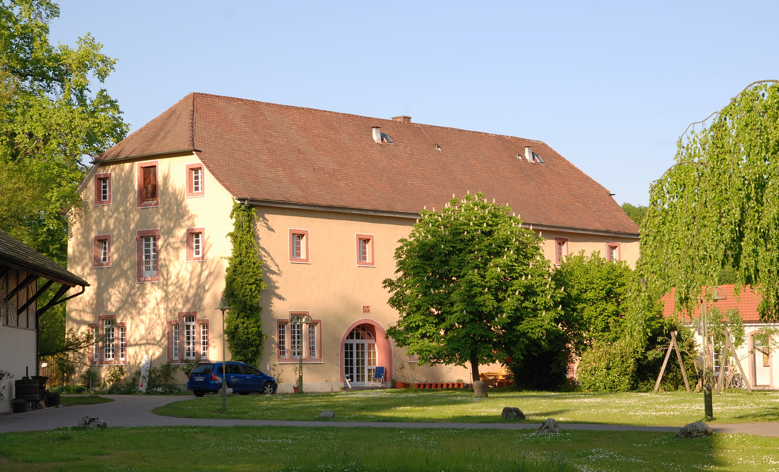 Schloss Beuggen: Schütte, rechts daneben im Ansatz ist der Friedrich-Kraft-Bau zu erkennen